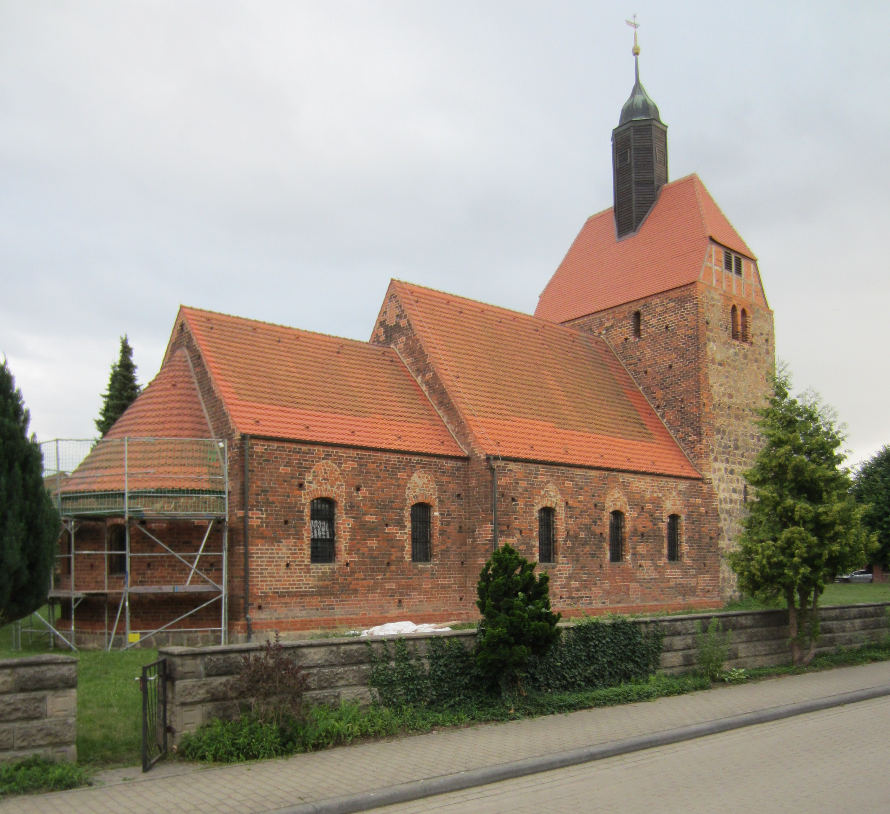 Denkmalgeschützte Dorrfkirche in Pechüle, Ortsteil von Treuenbrietzen, Ansicht von Nordosten. Der spätromanische Backsteinbau mit Feldsteinturm stammt aus dem 13. Jahrhundert.